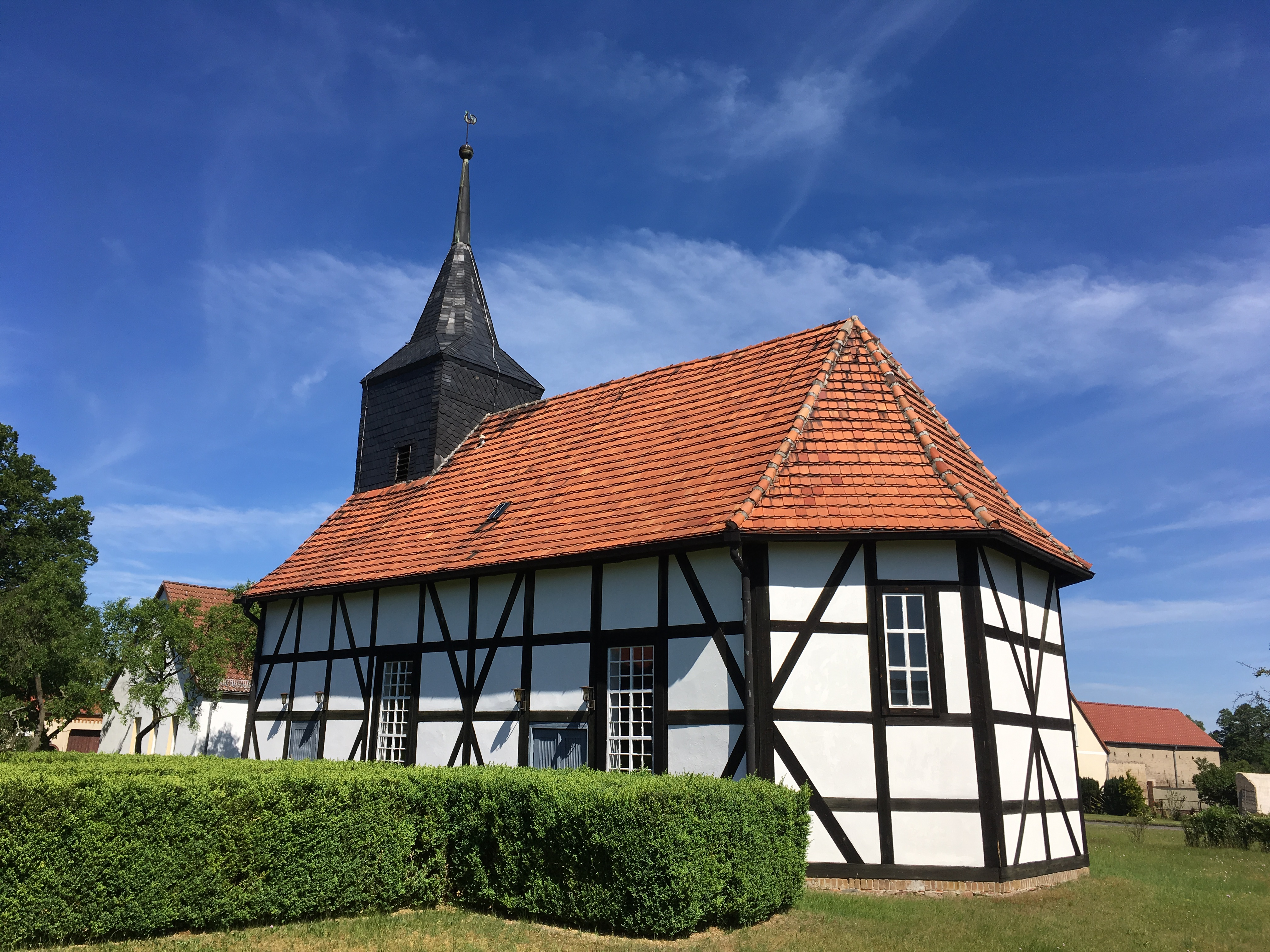 Die Fachwerkkirche in Dümde (Nuthe-Urstromtal) wurde im Jahr 1793 errichtet und 1881 um einen Kirchturm ergänzt. Die Ausstattung stammt aus der Bauzeit.